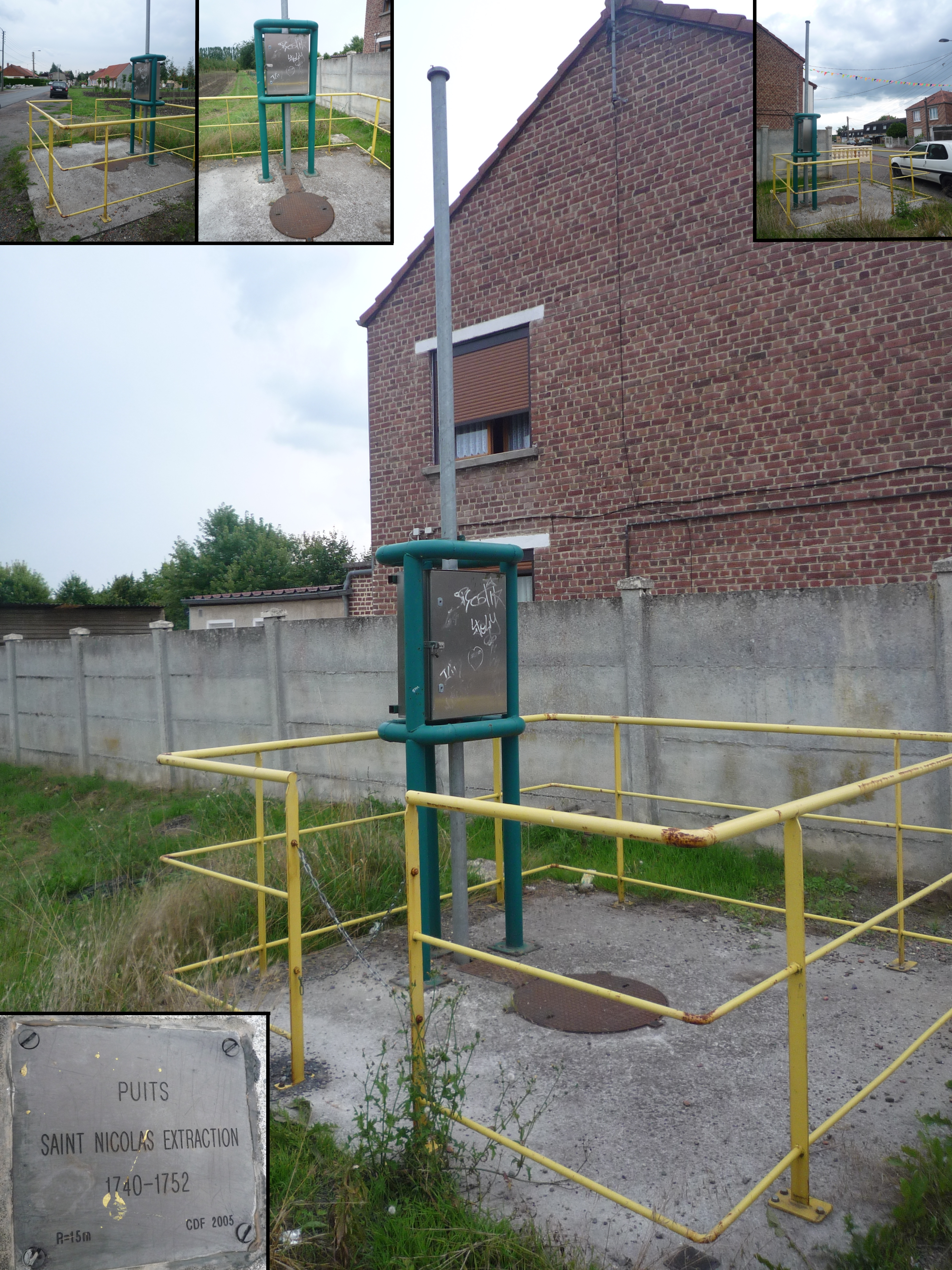 Puits Saint Nicolas Extraction de la Compagnie des mines d'Anzin à Fresnes-sur-Escaut, Nord, Nord-Pas-de-Calais, France.